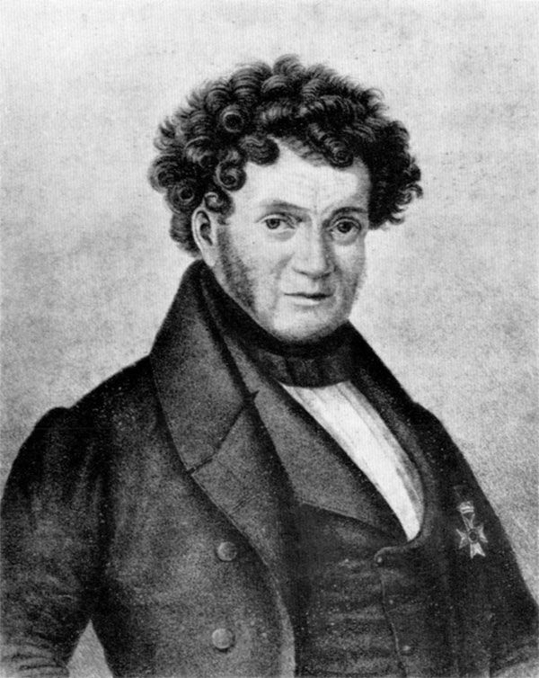 Porträtt av dr. Eberhard Munck af Rosenschöld (1775-1840).